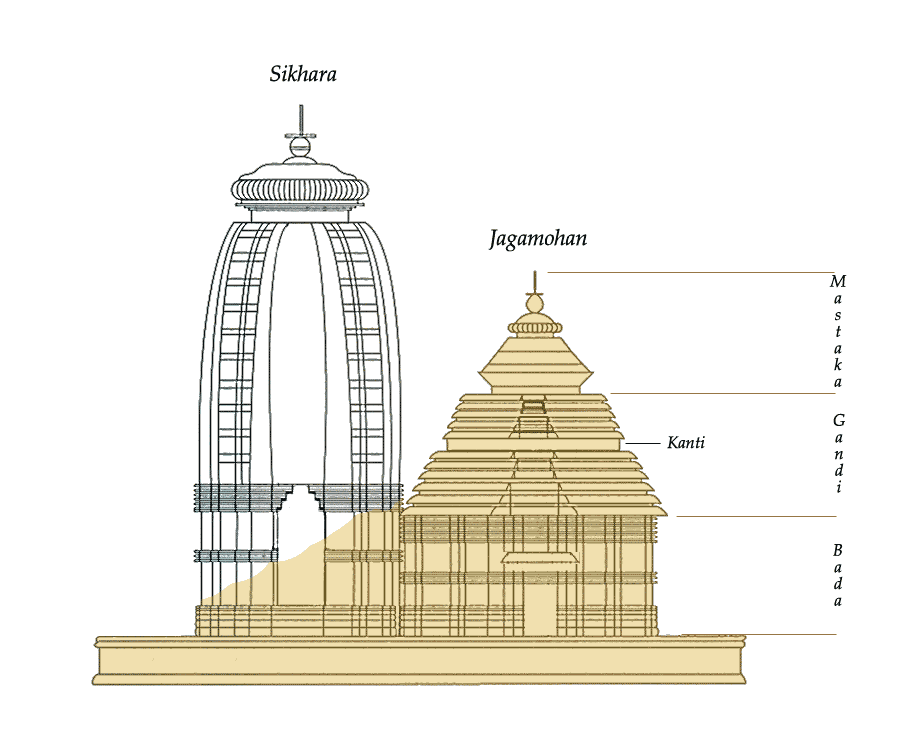 Structure du bâtiment principal de Konarak Source[edit] image composite fond inspiré de l'image tirée de Indian Architecture : Buddhist and Hindu, Percy Brown et reproduite dans la brochure Konarak de l'Archaeological Survey of India